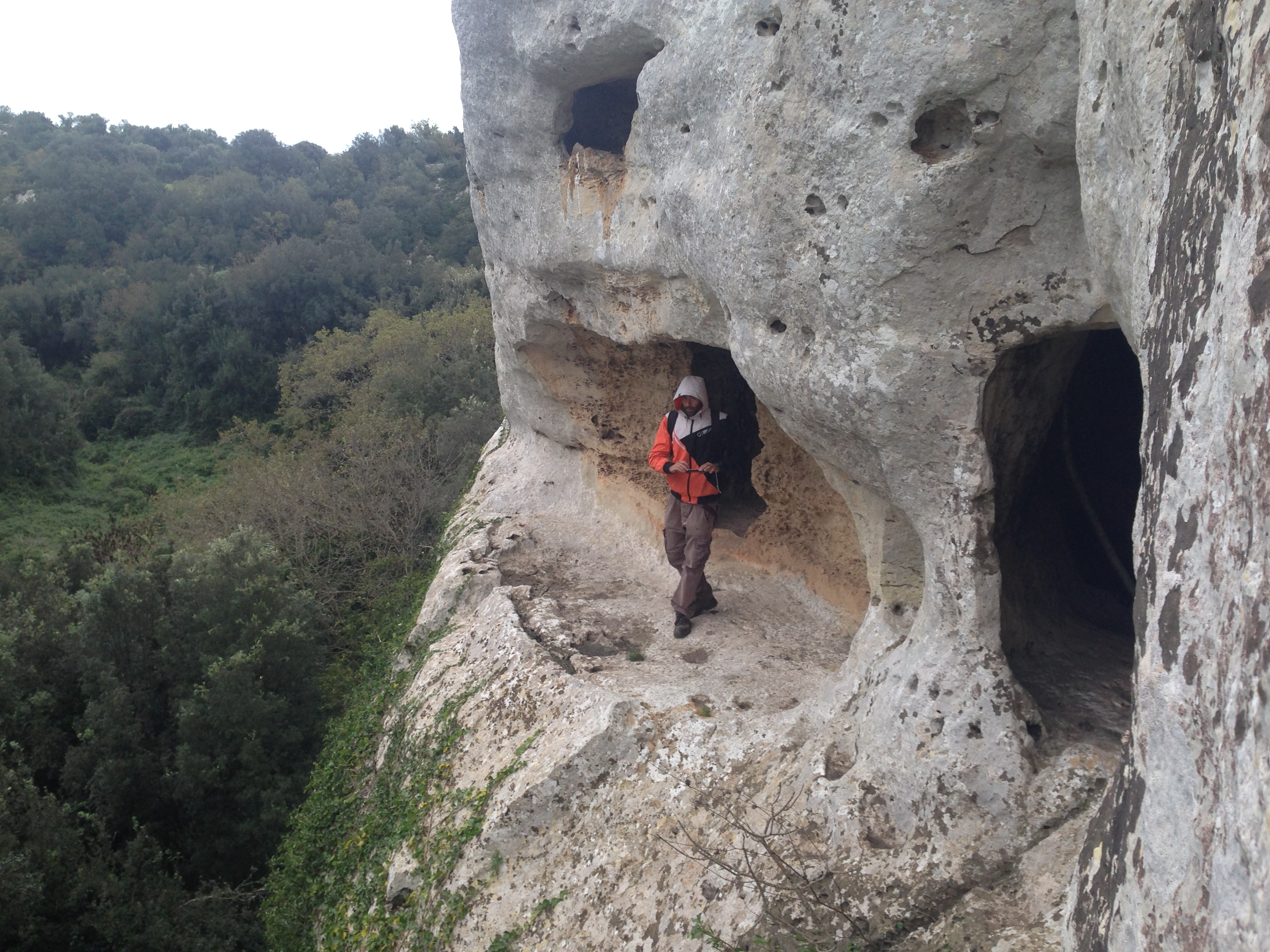 terrazza